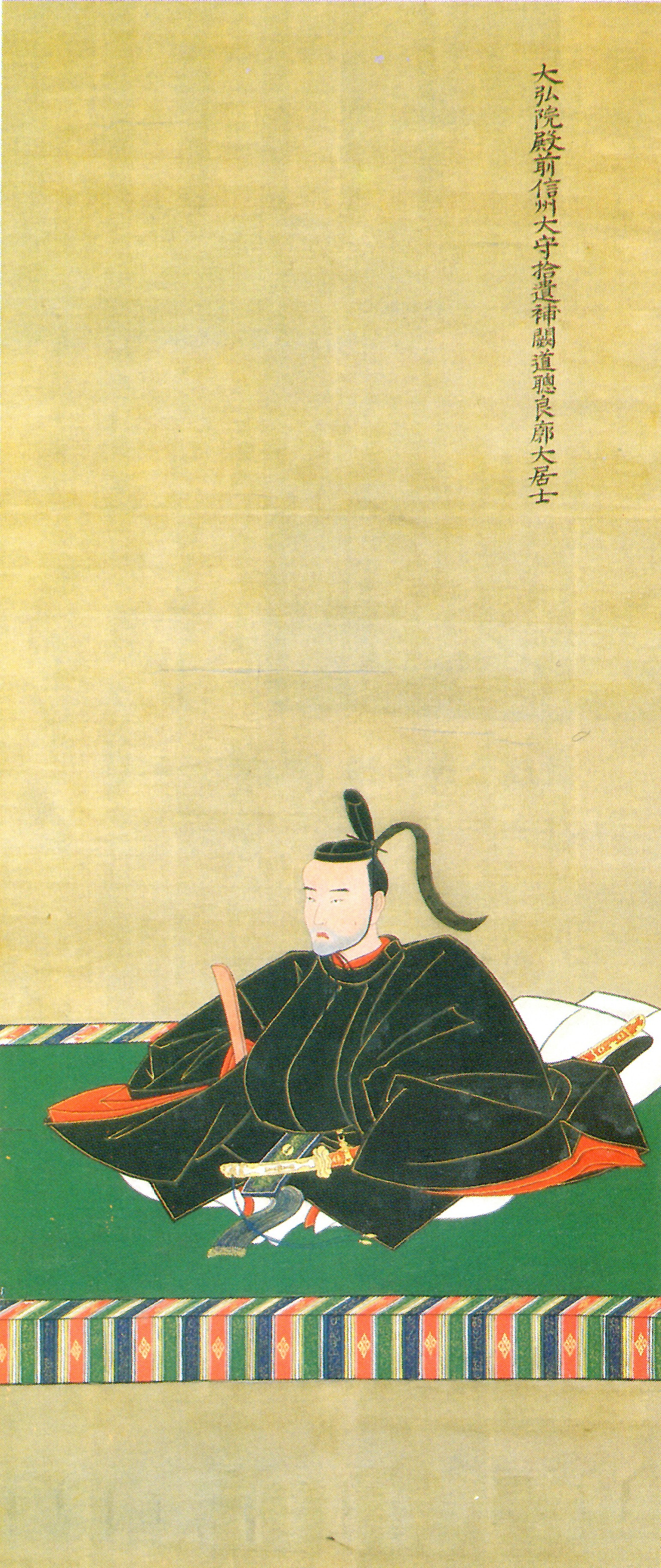 鍋島重茂の肖像。